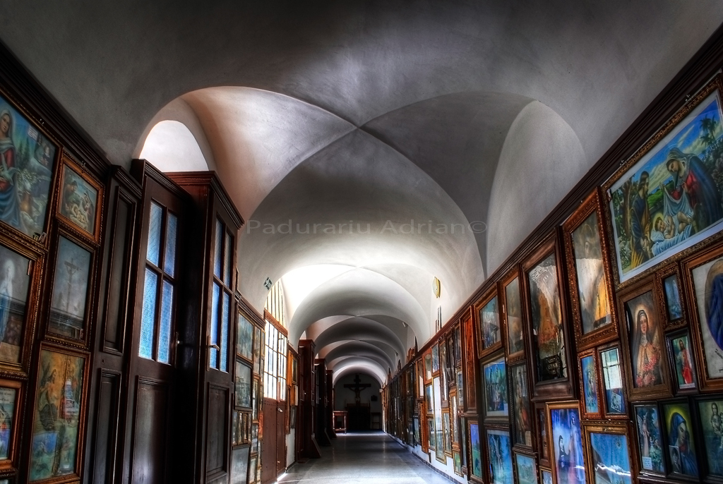 Radna-muzeul manastirii Maria Radna